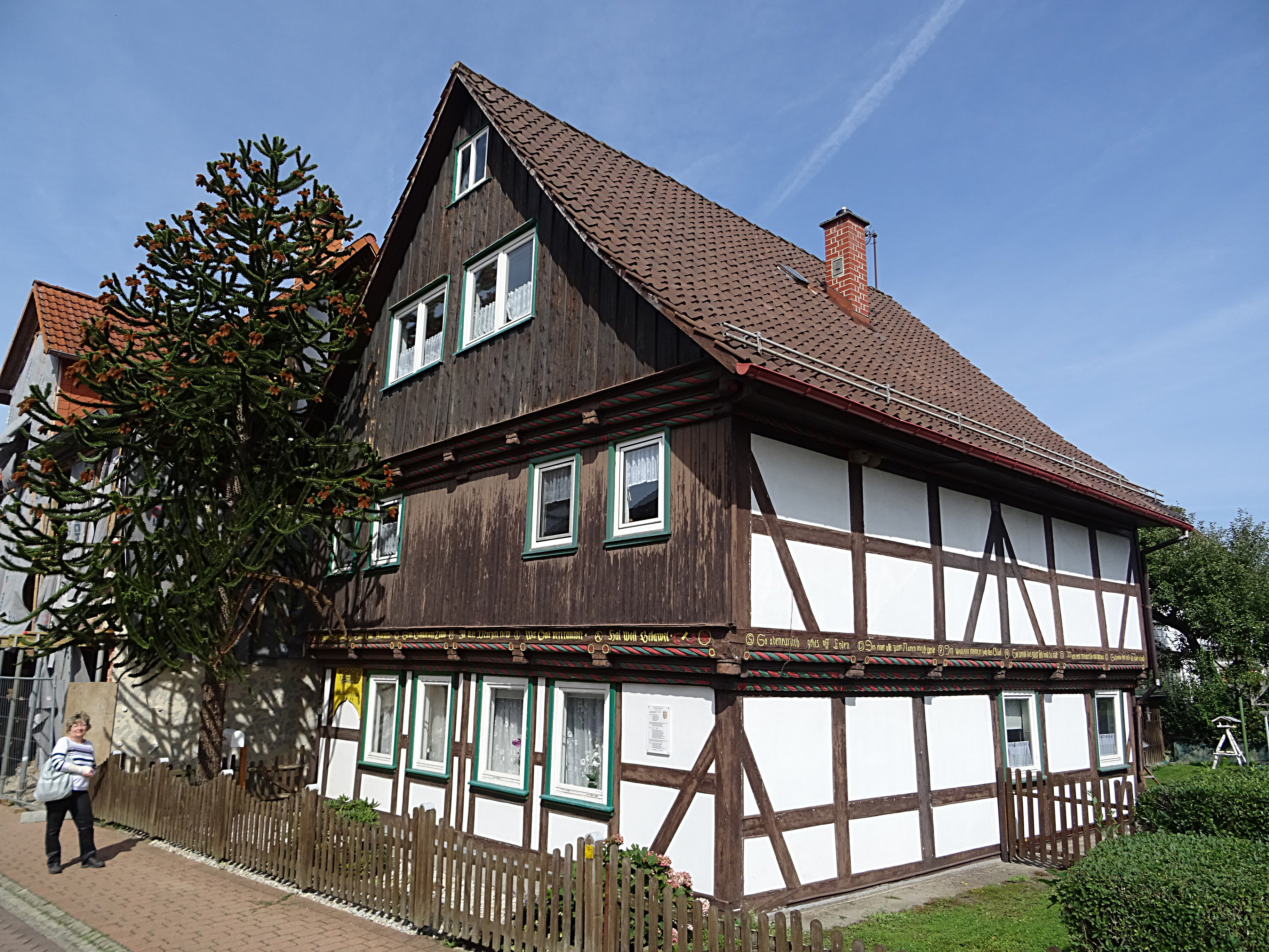 Ältestes Haus in Herzberg, 1501 erbaut von Till Lüder. Umschrift Frontseite: Vertraw Sich Wehm (V) Traw Gott Alleinn (D) Sein Gnade und Trav (M) Ist alle Morgen new (I) Wer Gott vertrauwet (A) Hat woll Gebawet. Umschrift Ostseite: (S) So abeneuerlich gehts off Erden (D) Das einer offt zum Naren muß werde (P) Den wan einr meine, er hab das Glück (N) So wendt das Glück sich bald zurück (Q) Wann eynr meint es sei mit ihm aus (C) So kombt ihm bald das Glück zu Hauß (M). Die eingekreisten Buchstaben sind lateinische Bibelsprüche: Verbum Domini Manet In Aeternum - (Das Wort des Herrn bleibt in Ewigkeit) und: Si Deus Pro Nobis, Qui Contra Me? - (Wenn Gott für uns ist, wer ist wider mich?)